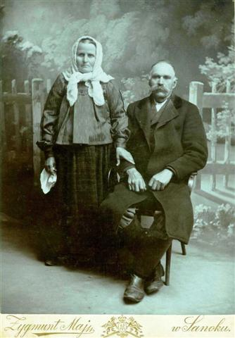 Wojciech i Katarzyna Boroniowie. Zdjęcie zrobione w Zakładzie Zygmunta Maja w Sanoku ok. roku 1925.